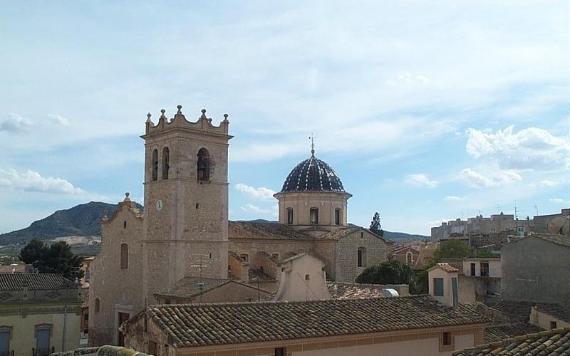 Imagen de la Iglesia de Santa Catalina